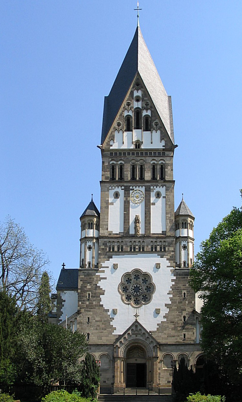 Elisabethkirche, Bonn-Südstadt